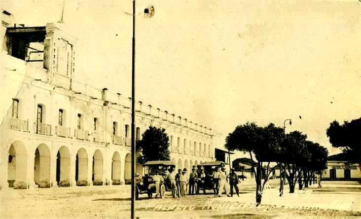 palacio de juchitan antiguo